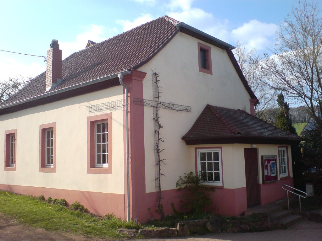 Mennonitenkirche Kühbörncheshof in Katzweiler, Rheinland-Pfalz, Deutschland / Germany